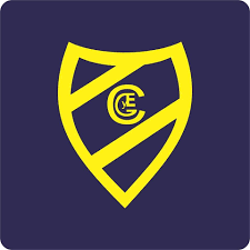 Amarillo-Azul